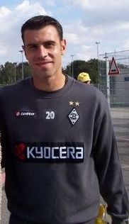 Roberto Colautti